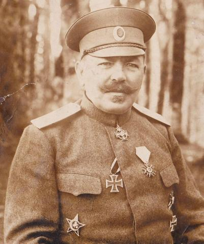 Генерал-майор Алекси Попов